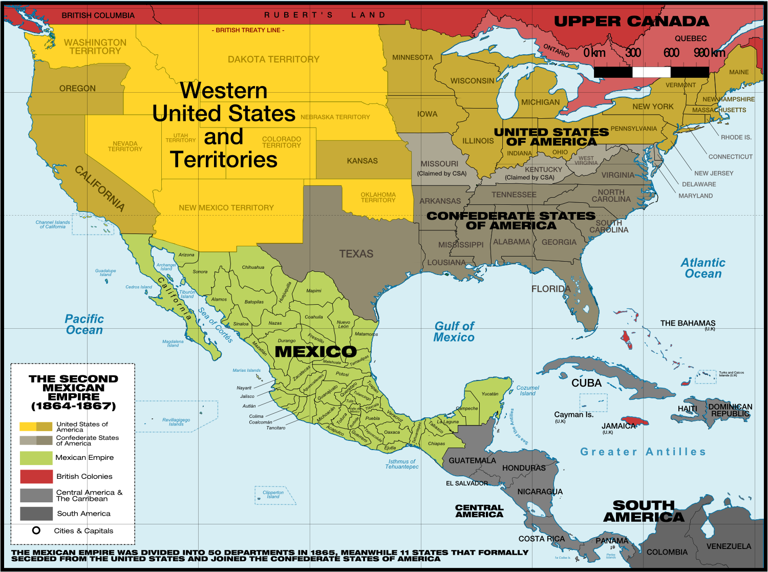 Second Mexican Empire